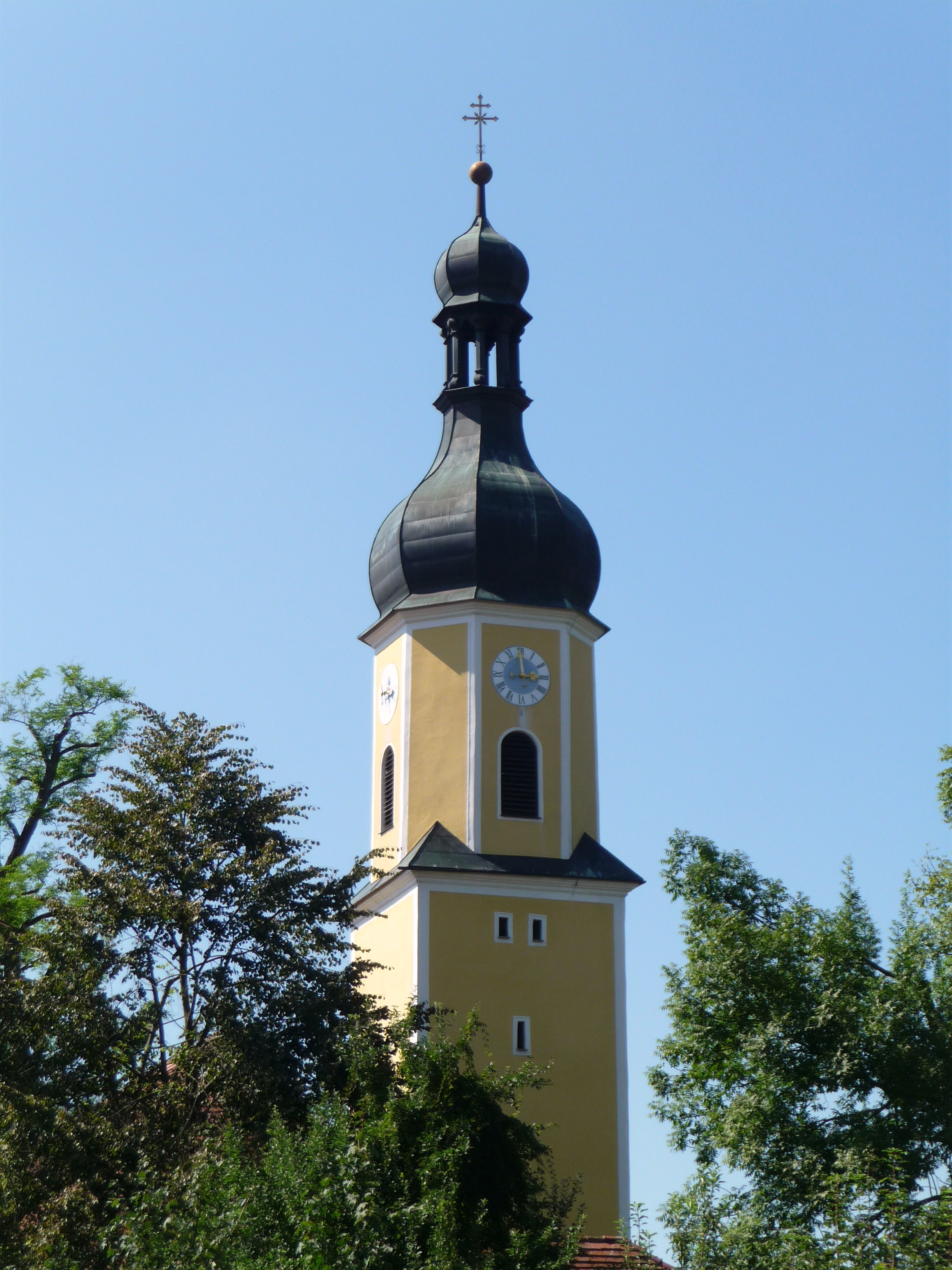 Der Turm der Pfarrkirche St. Elisabeth in Blaibach